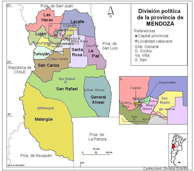 Mapa de la provincia argentina de Mendoza con su respectiva división política.